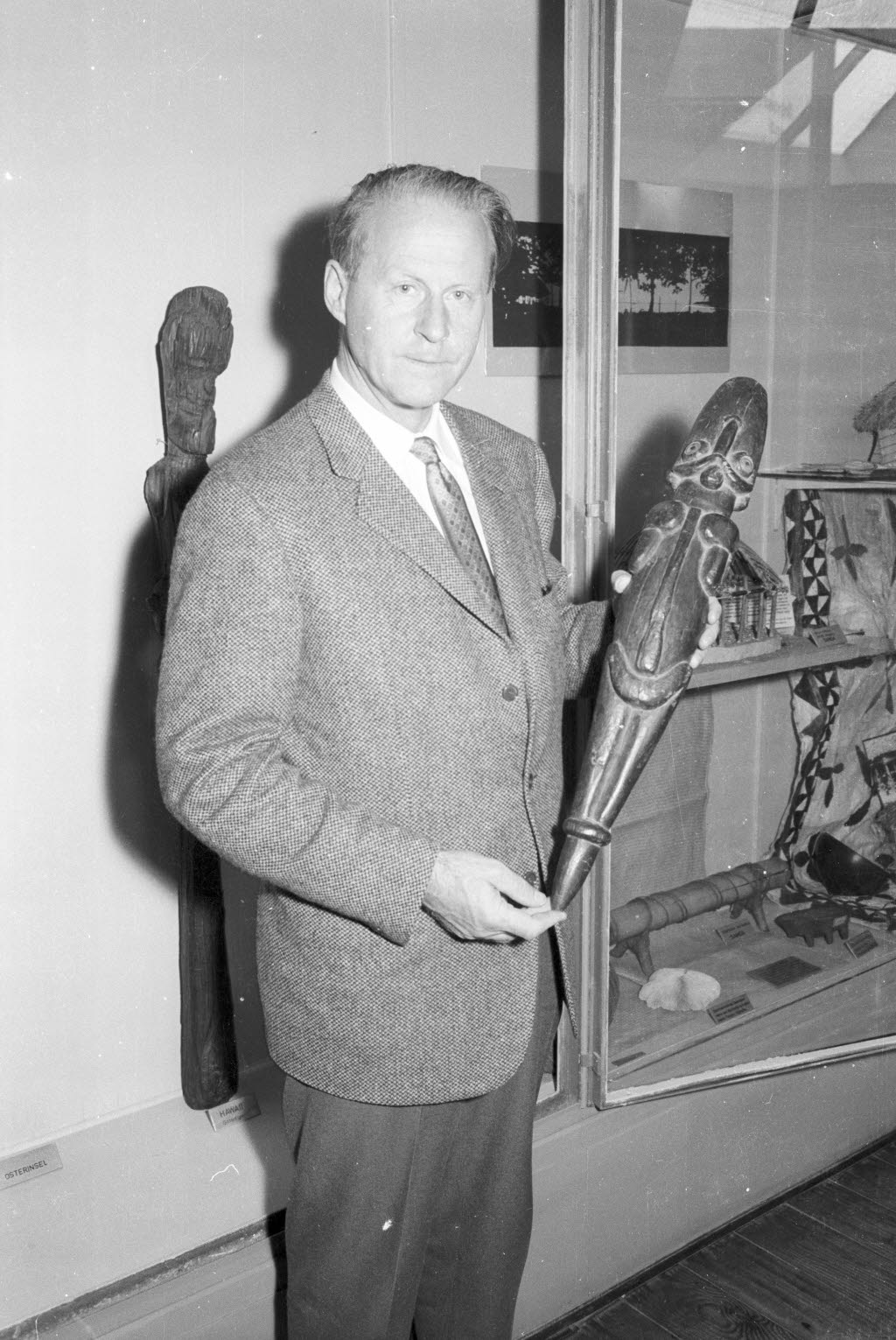 im Völkerkundemuseum der Christian-Albrechts-Universität (CAU) mit einer "Mokomoko"-Holzfigur von der Osterinsel.